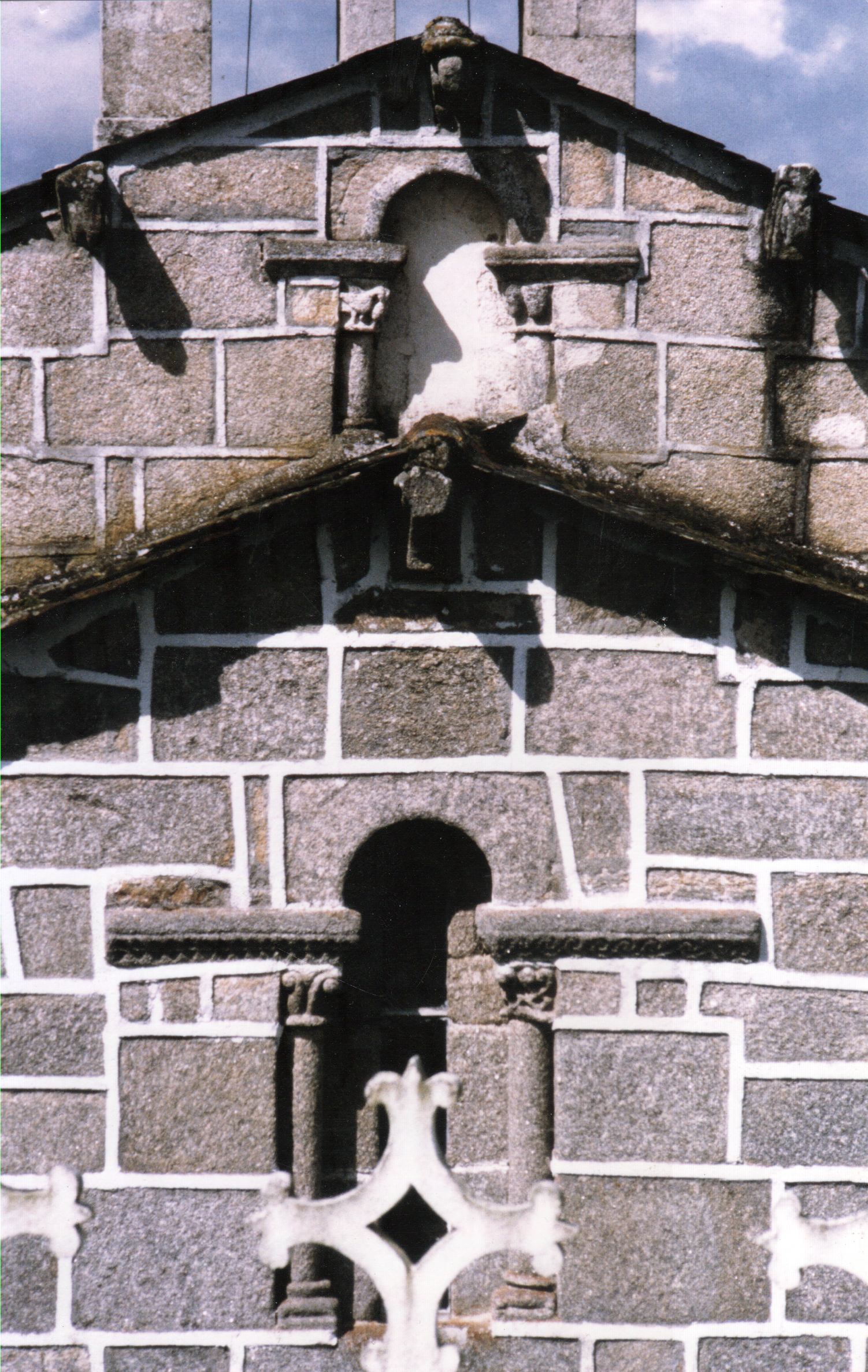 Iglesia de santo André de Paradela (Sarria)